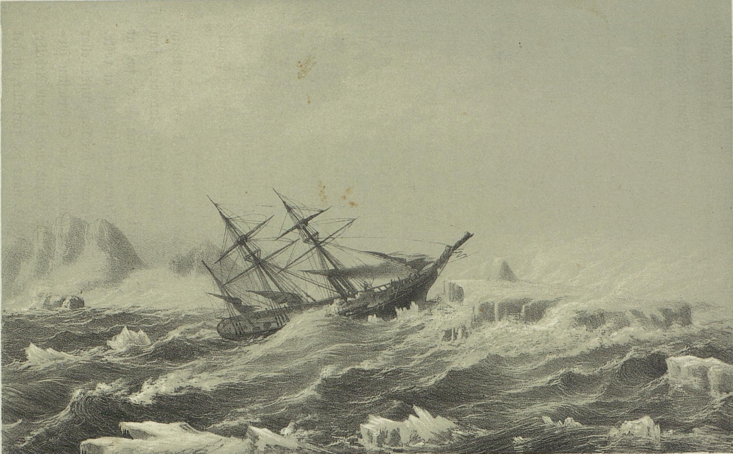 Illustrasjon hentet fra boken "Fox-Expeditionen i Aaret 1860 over Færøerne, Island og Grønland" av Zeilau, Th. og utgitt av Wøldike (Kjøbenhavn, 1861)